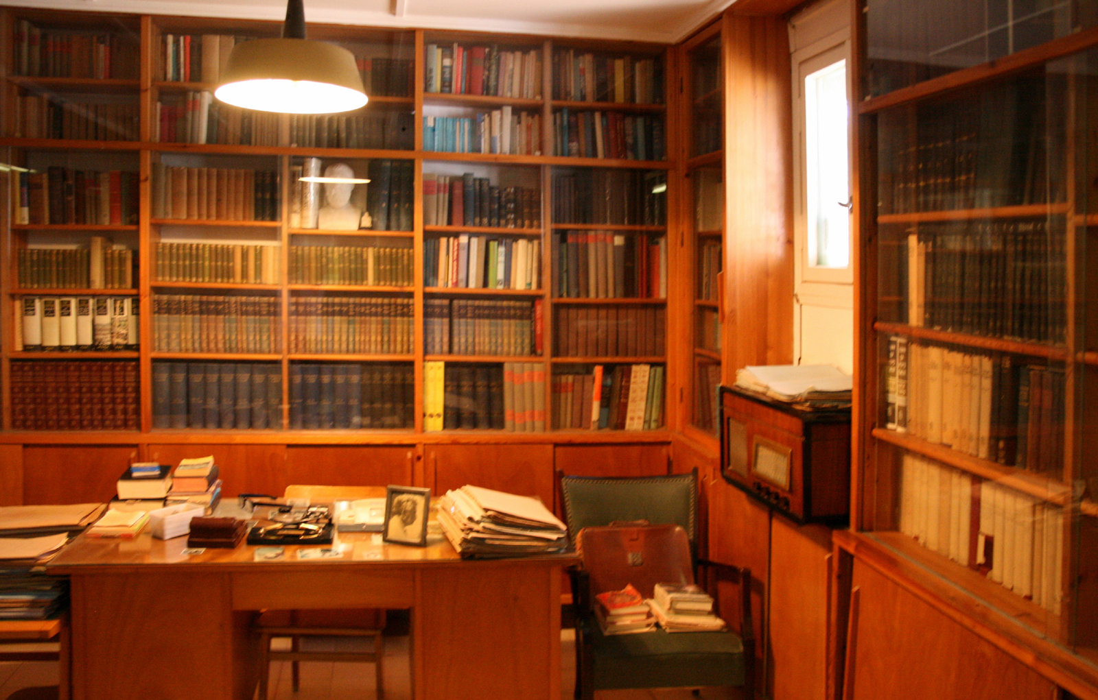 Sde Boker - Ben Gurion Home